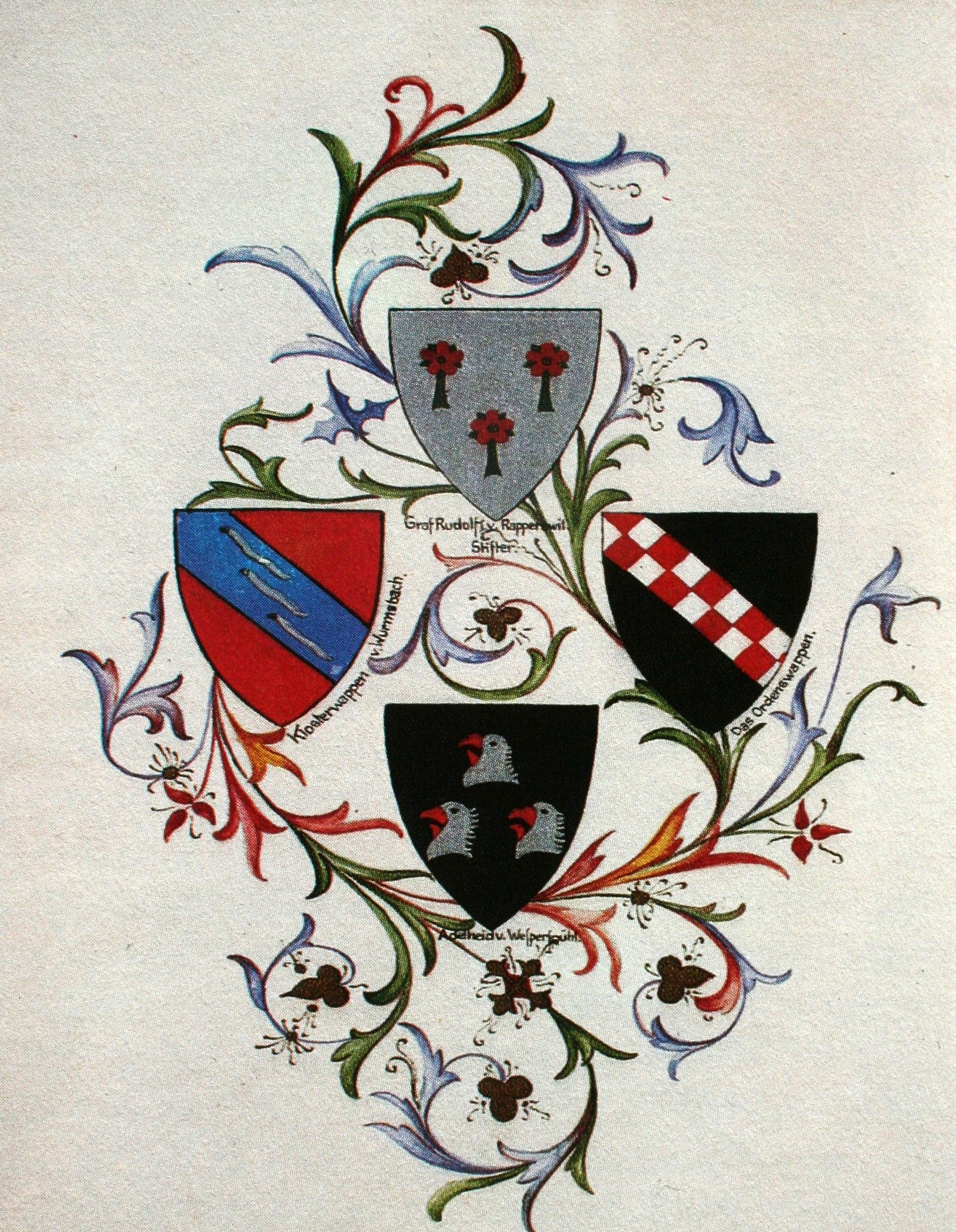 Kloster Wurmsbach: Wappen von Rud. von Rapperswil, des Ordens, der ersten Äbtissin und des Klosters Wurmsbach (im Uhrzeigersinn)